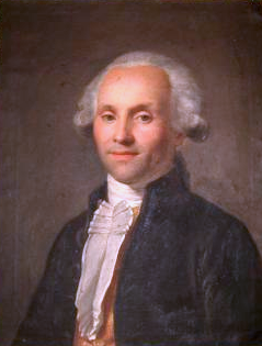 Portrait de Victor d'Hupay (v.1790)